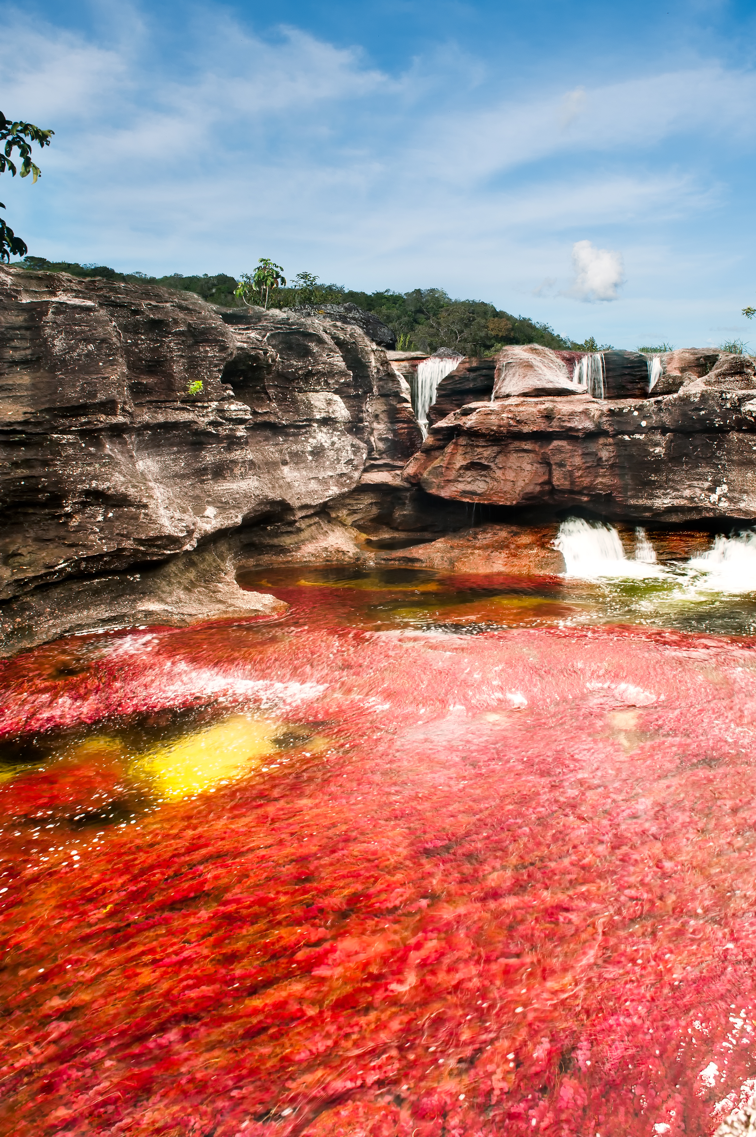 Caño Cristales es conocido como el río de los cinco colores. Está ubicado en La Macarena, Departamento del Meta, en Colombia. El color del río lo produce la planta llamada Macarenia Clavigera.